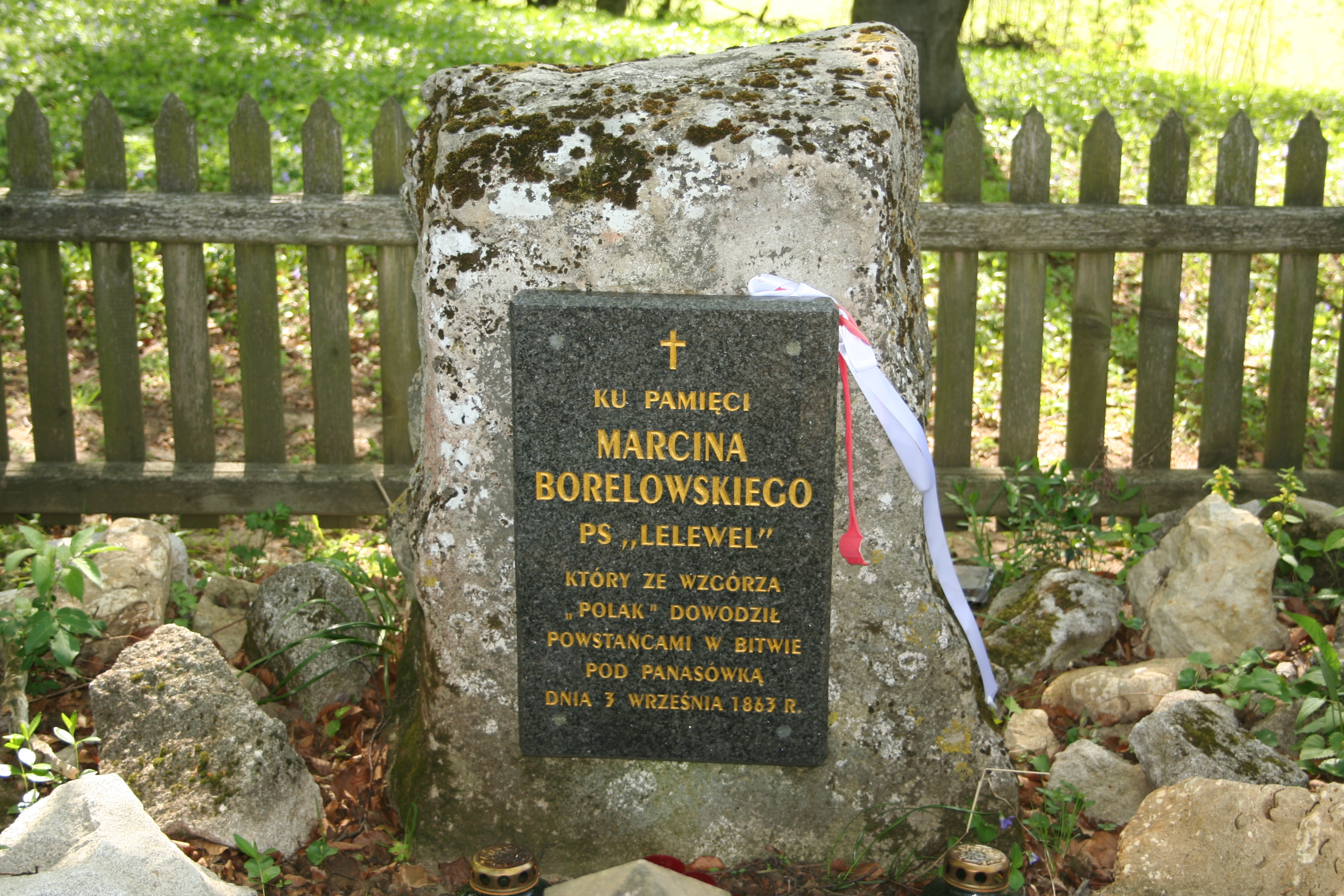 tablica upamiętniająca miejsce dowodzenia Marcina Lelewela Borelowskiego na Wzgórzu Polak niedaleko Panasówki w czasie powstania styczniowego